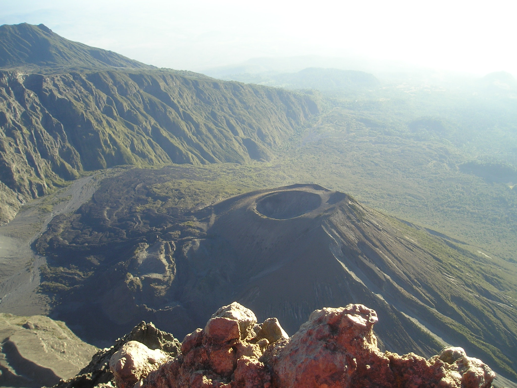 Image du "ash cone" depuis le sommet du Mont Méru (Tanzanie) Photo prise par utilisateur Galano en février 2006